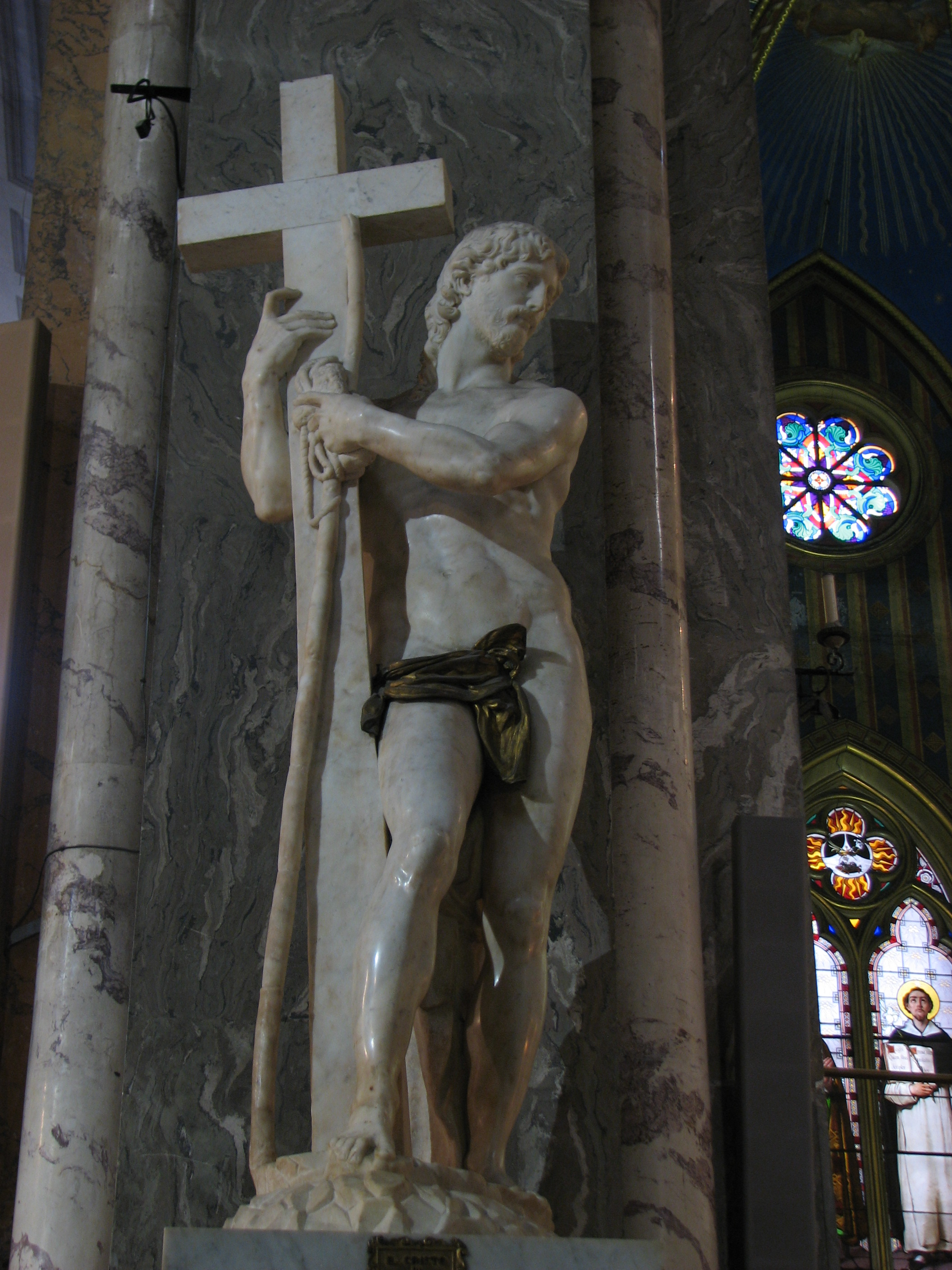 Il Cristo Redentore di Michelangelo. Santa Maria sopra Minerva, Roma, Lazio, Italia